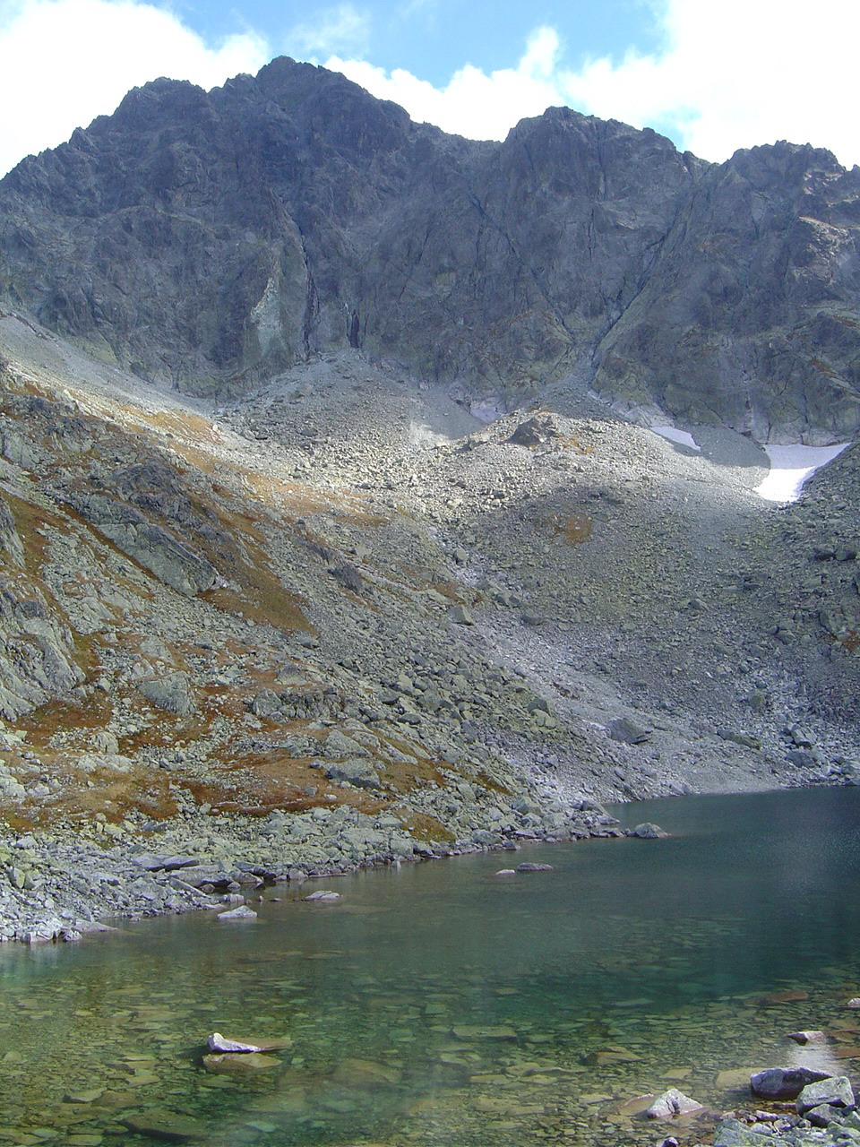 Vychodna Vysoka over Zamrznute pleso.jpg